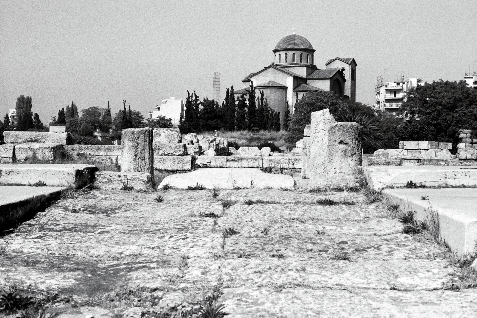 Rampe des Propylons vom Pompeion